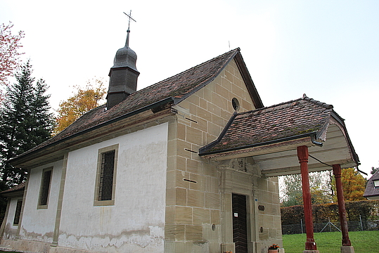 Chapelle Notre-Dame de Montban, Farvagny, dans la commune de Gibloux